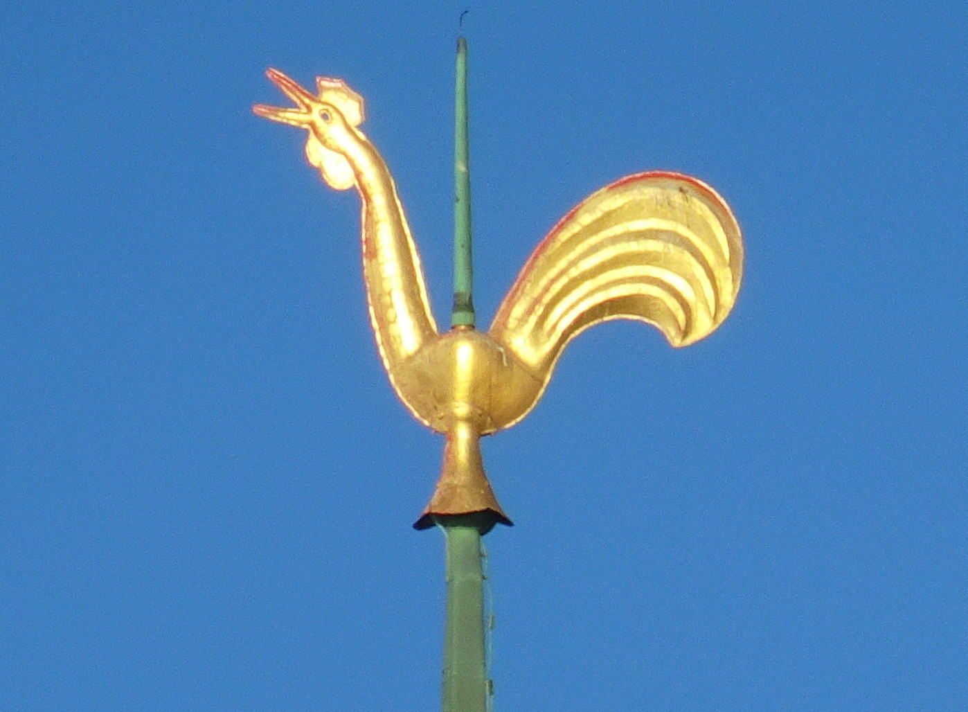 Högalidskyrkan, tuppen, den vann priset 1995 Årets Kyrktupp, som anordnas av Svenska kyrktuppsfrämjandet.